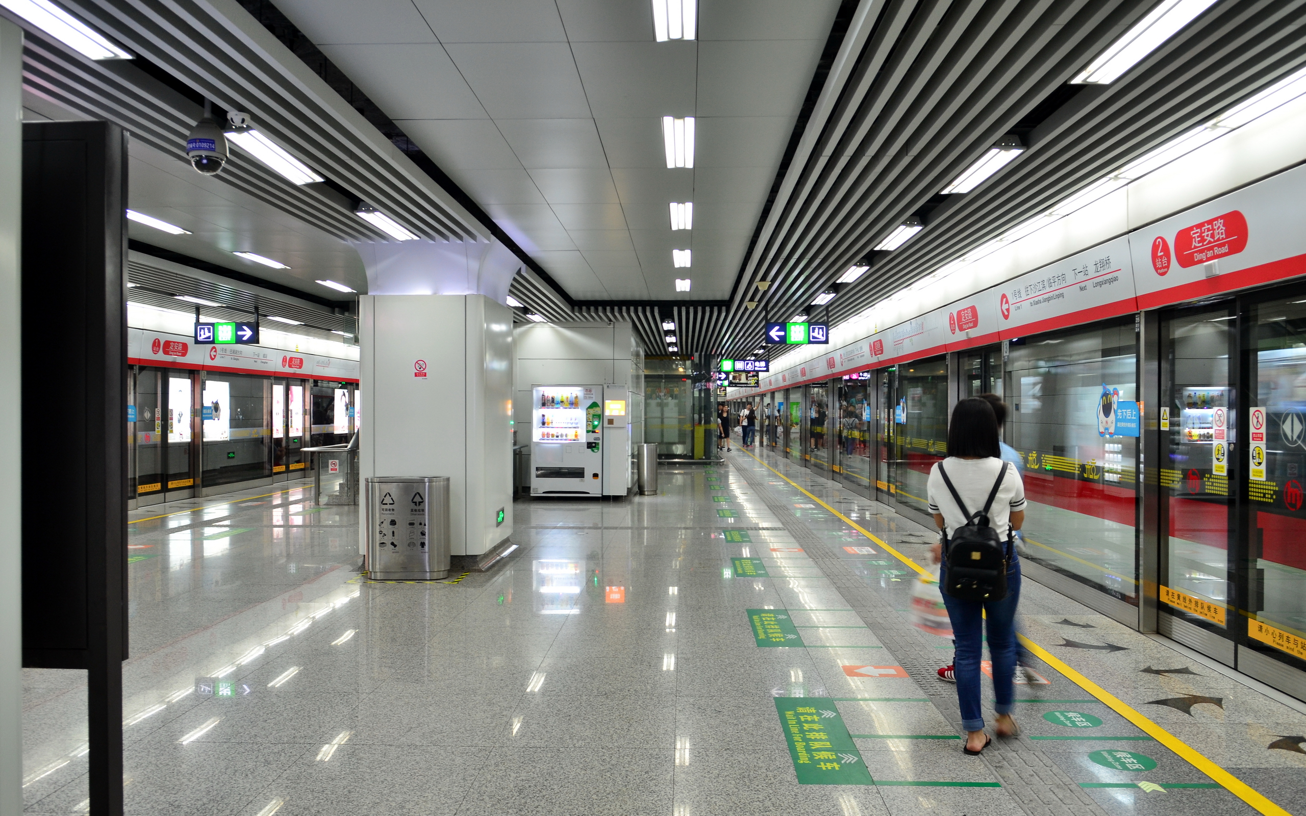 杭州地铁1号线定安路站岛式站台